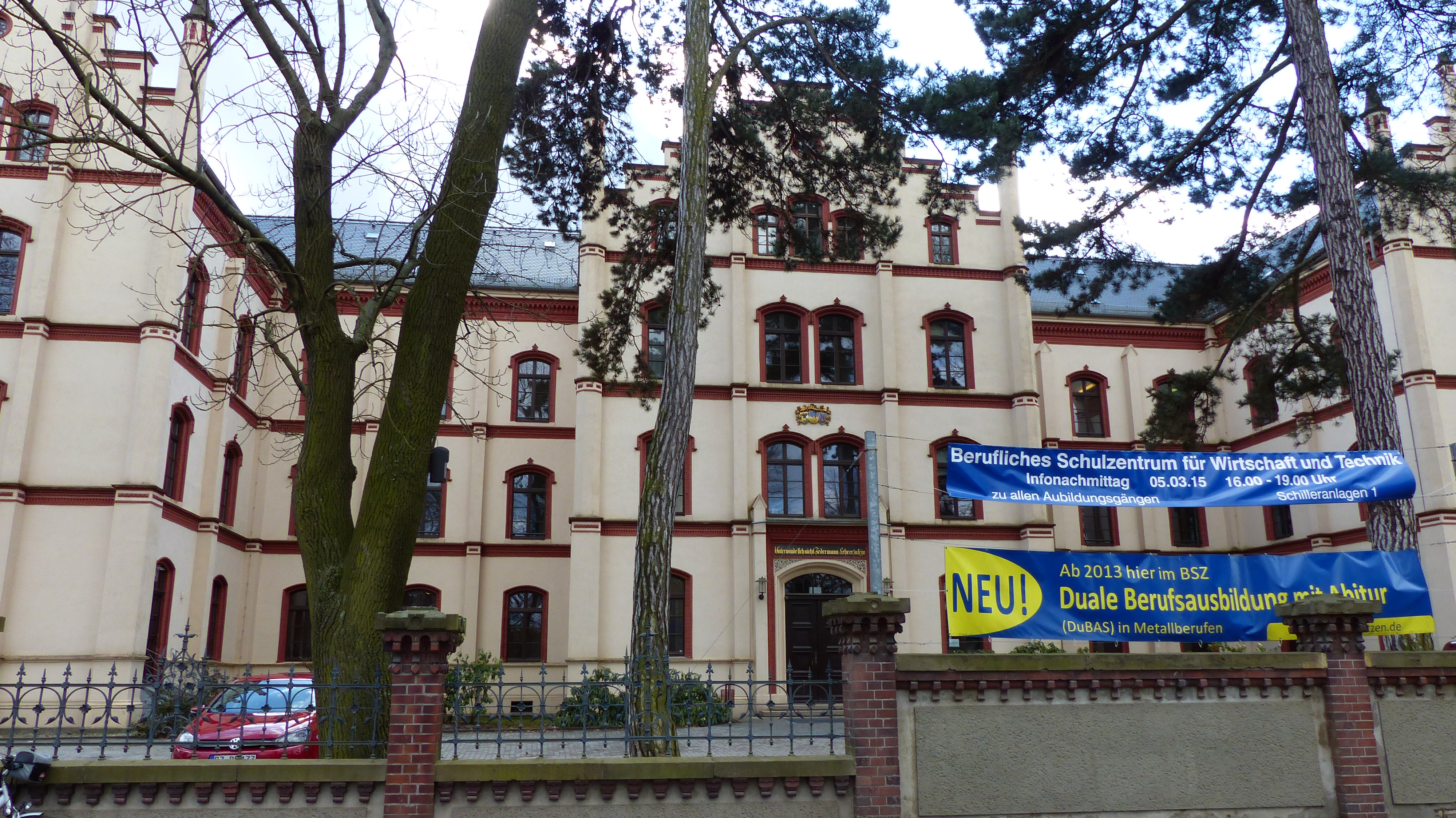 Berufsschulzentrum (ehem. Landständisches Seminar), Schilleranlagen 1, Bautzen